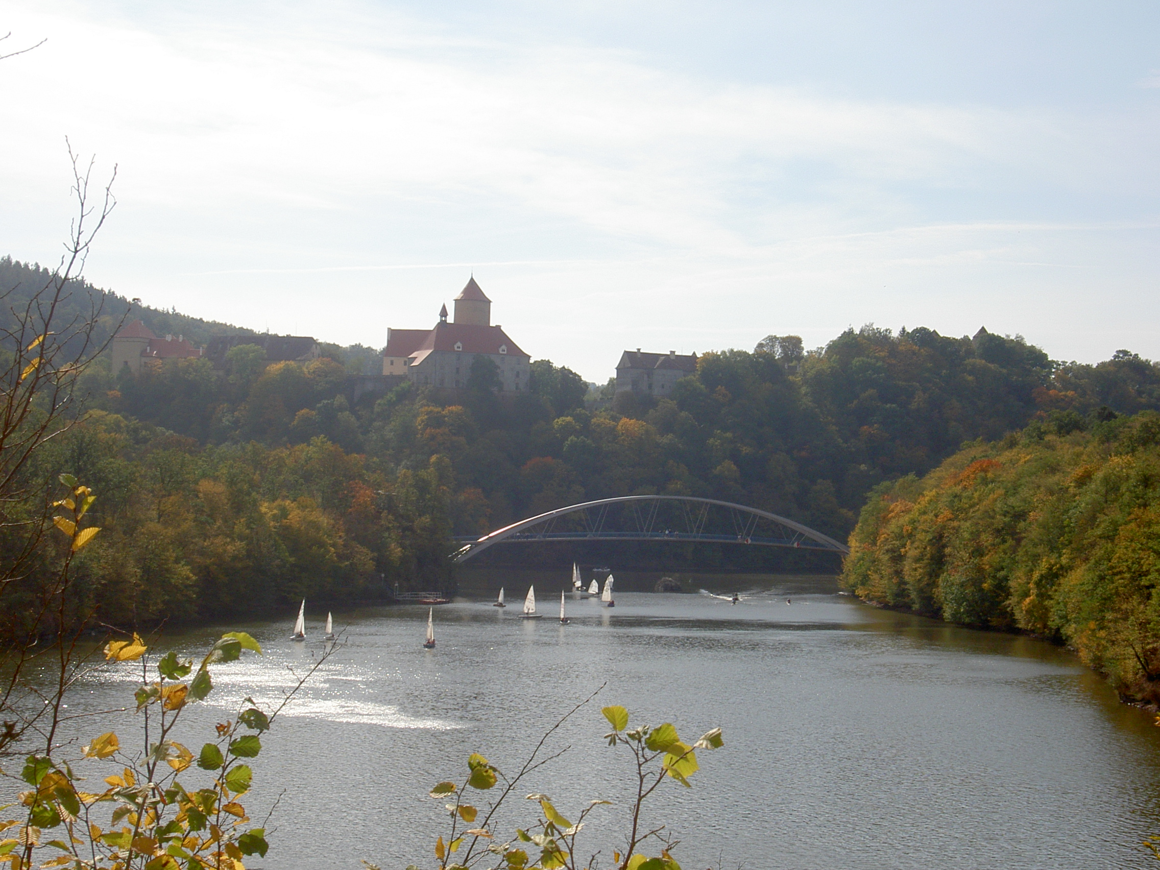 Brněnská přehrada a hrad Veveří